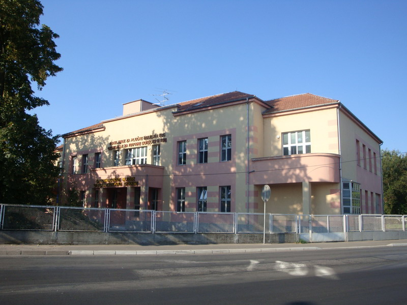 Одјељење за плућне болести и ТБЦ (Брчко)